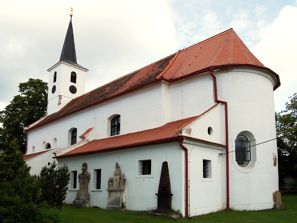 Kostel sv. Petra a Pavla (Horní Dubňany), Horní Dubňany